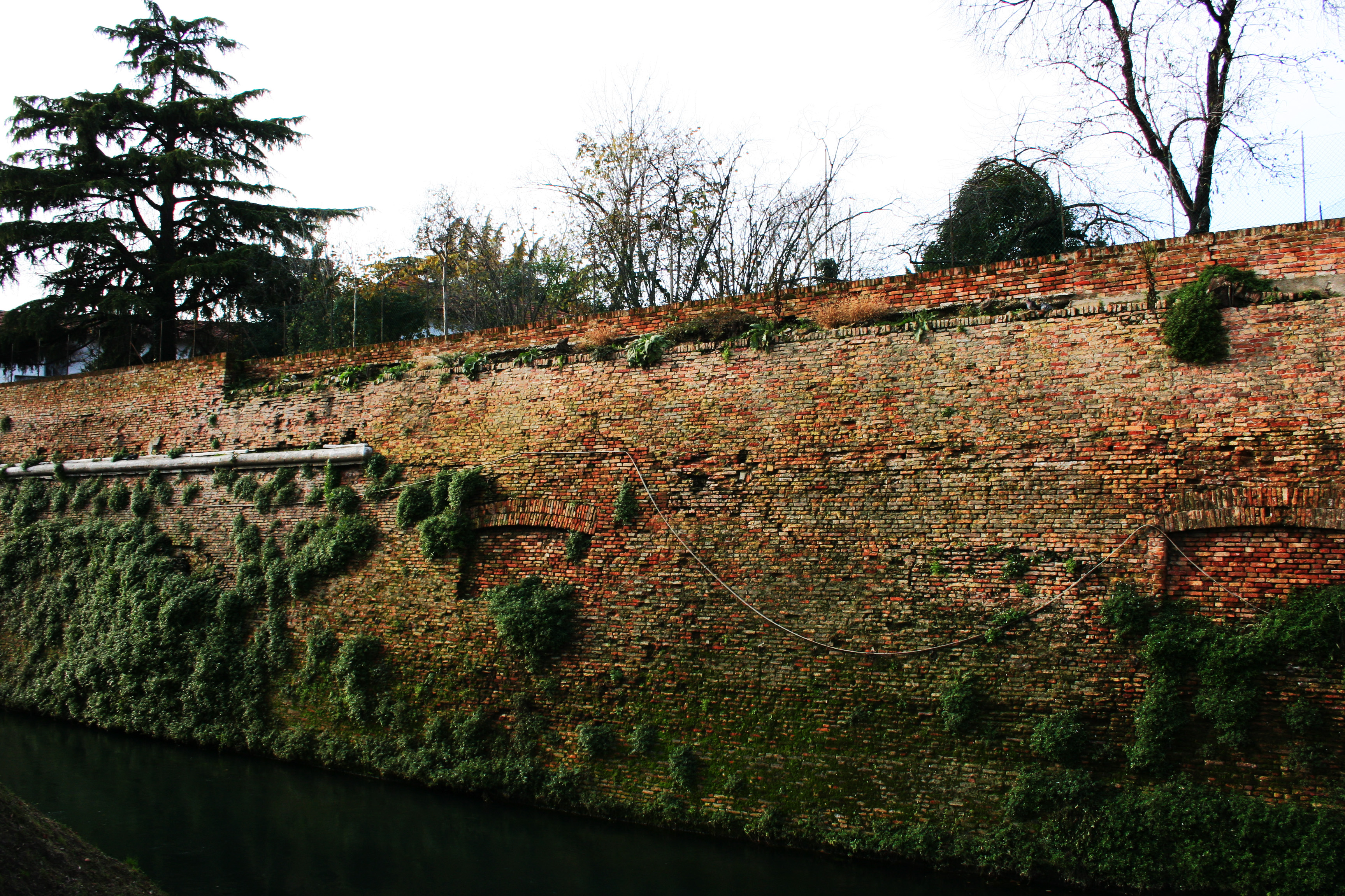 Treviso, Veneto, Italy